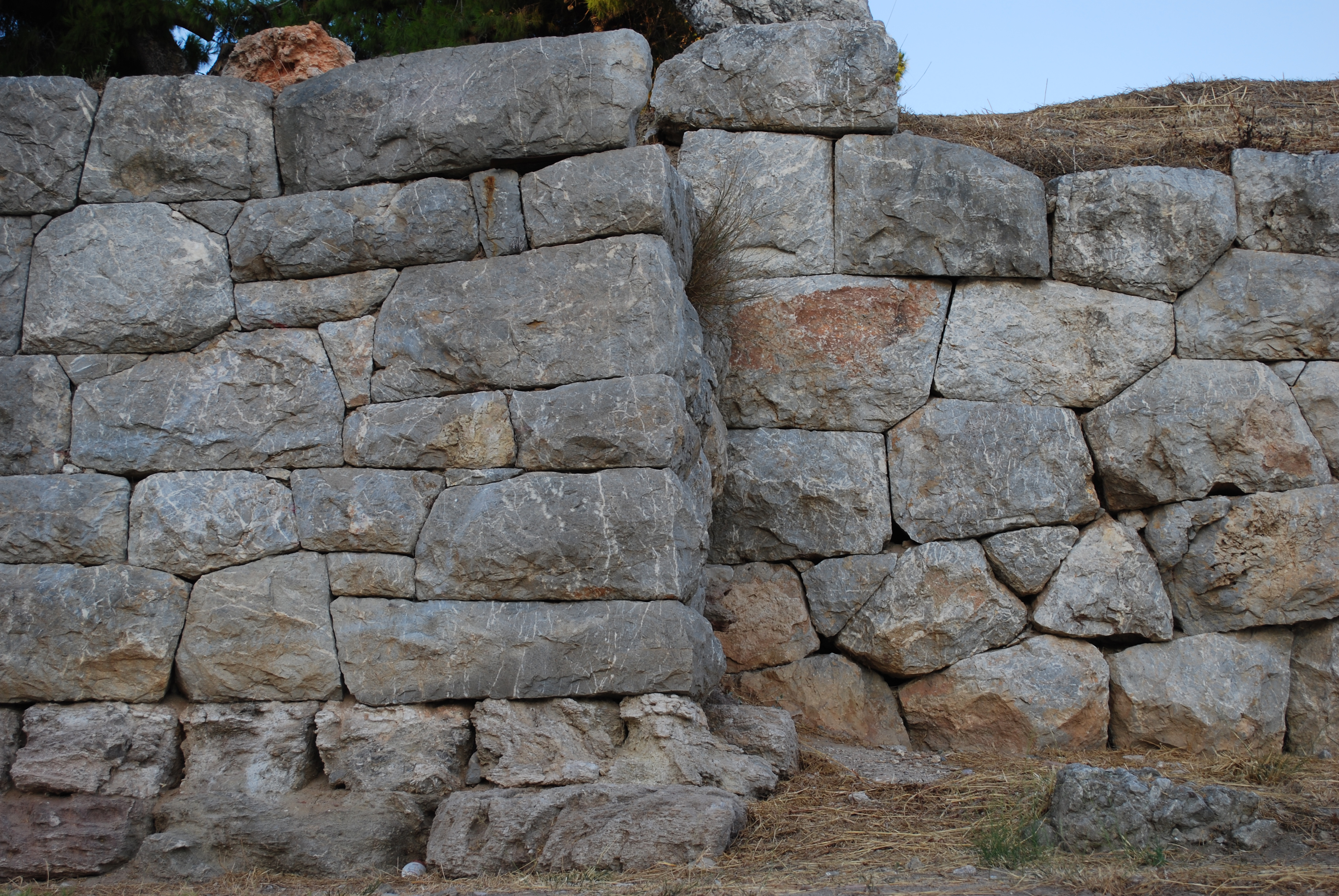 Asiné : l'enceinte mycénienne en appareil polygonal.